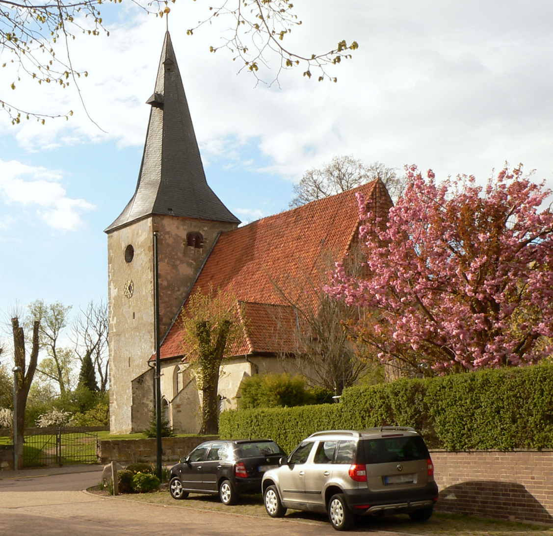 St. Dionysiuskirche (Adensen)